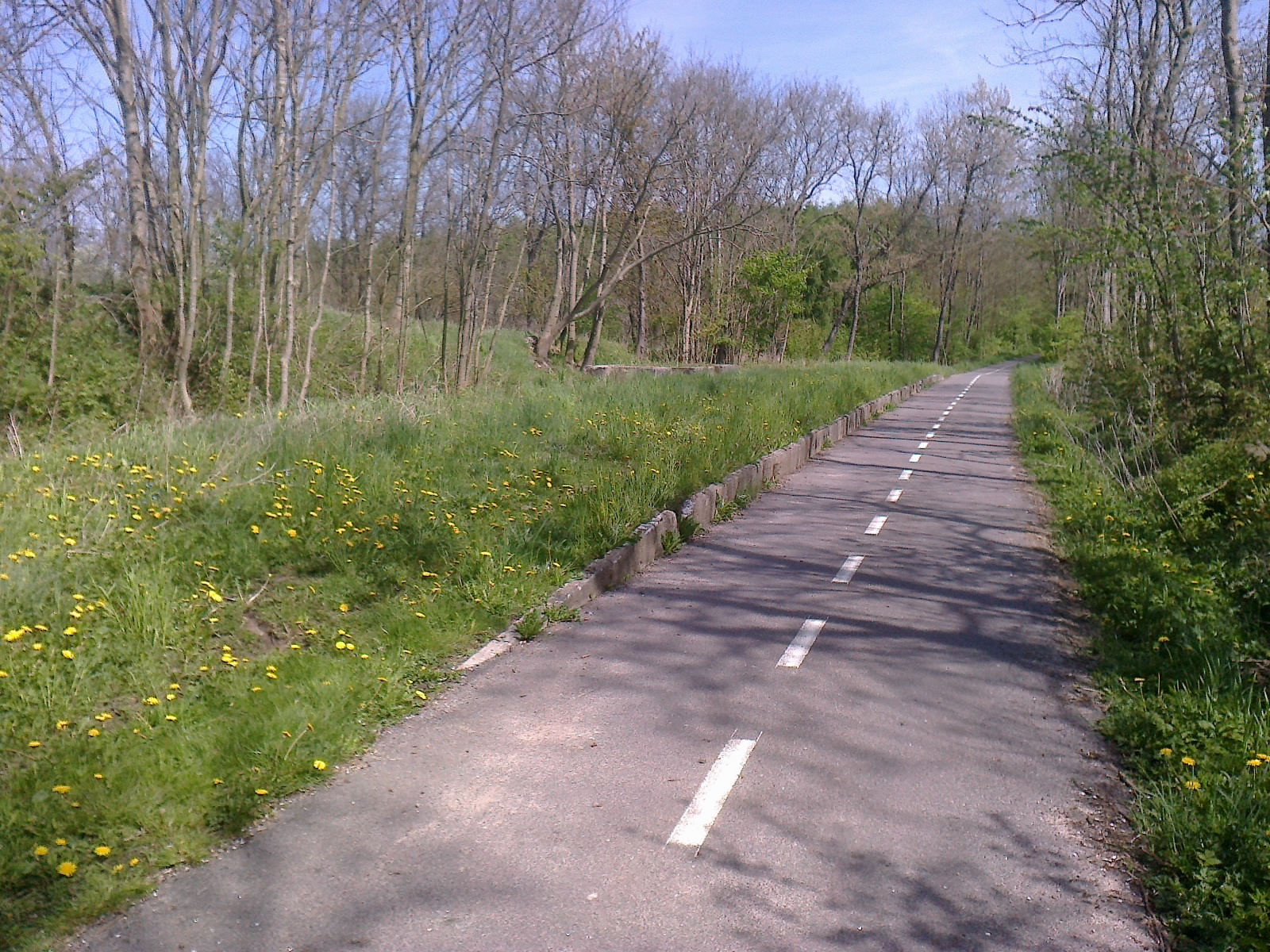 Nordre Jernbanesti passerer Blykobbe Trinbræt med perronkant og fundament fra læskur